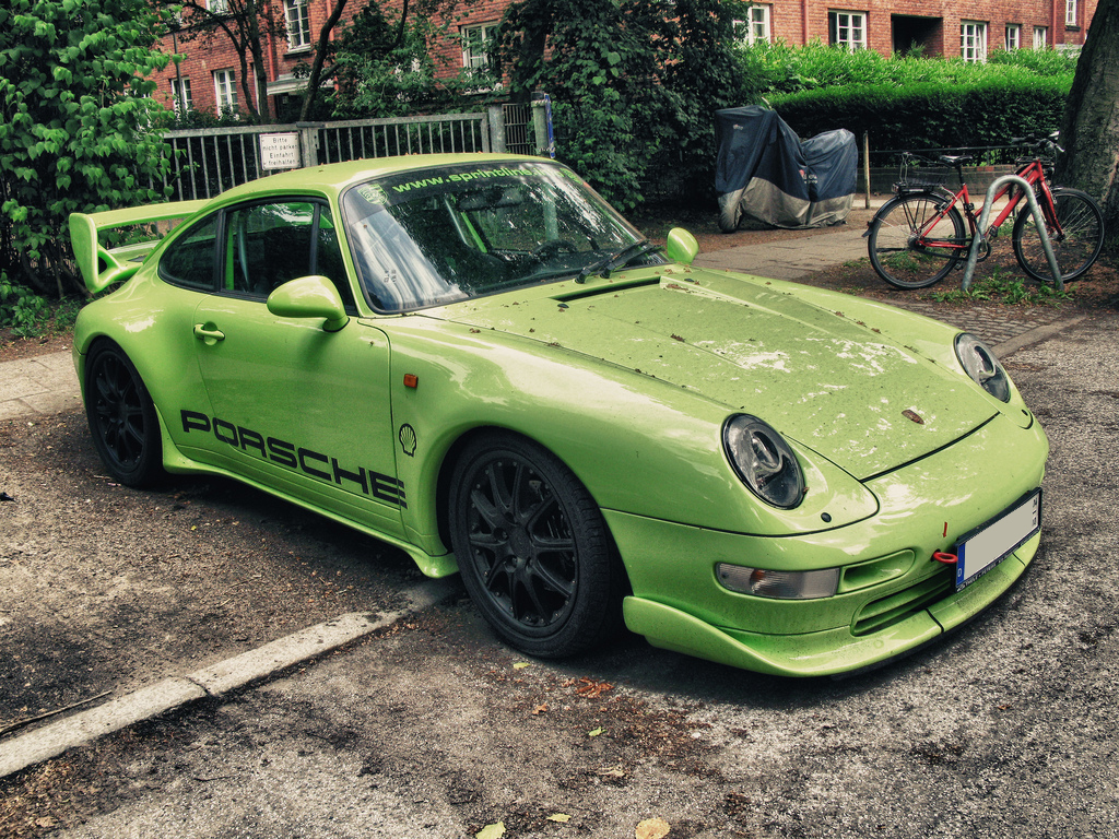 Porsche 993 RS Clubsport